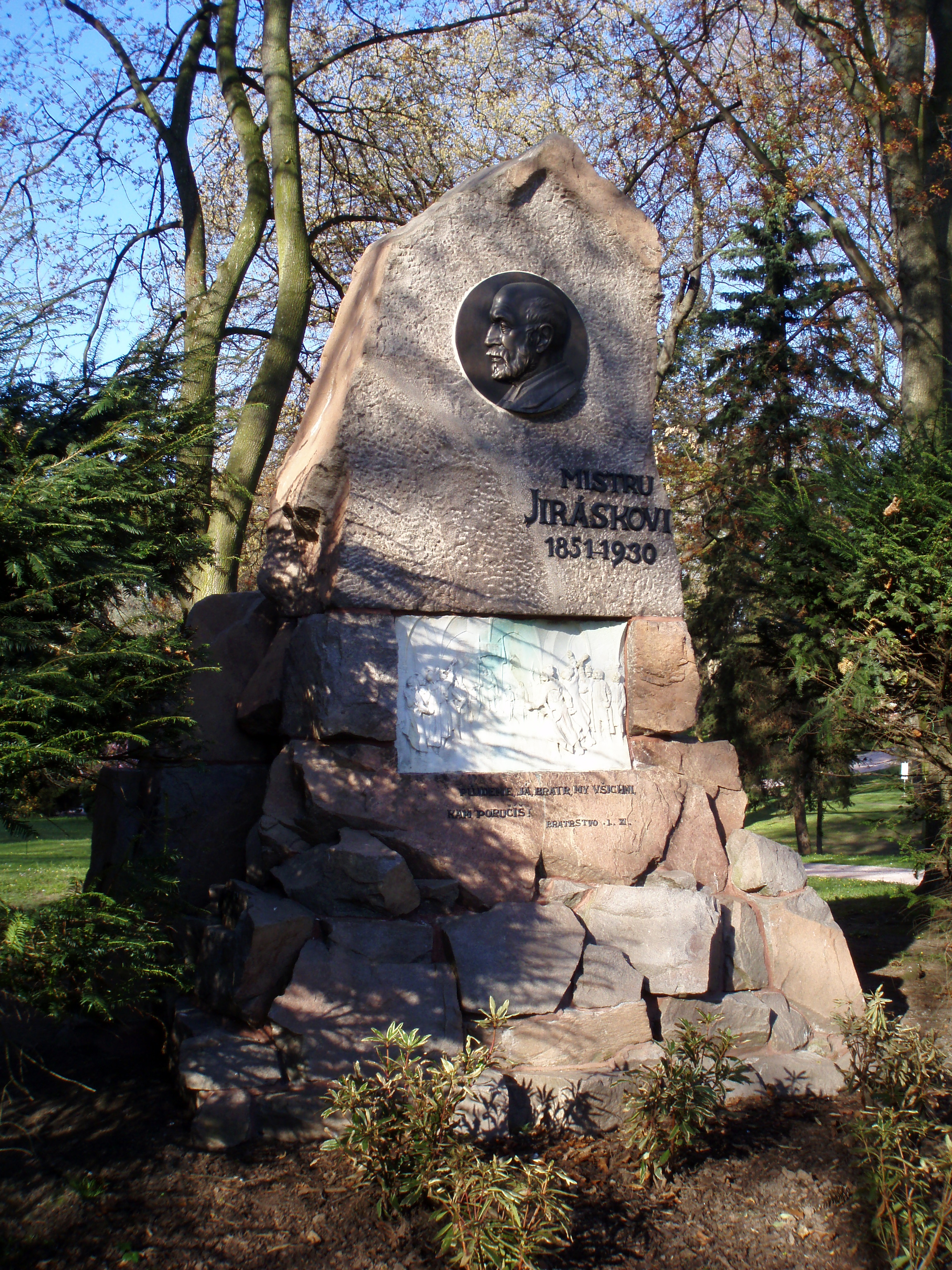 Pomník A. Jiráska v Jiráskových sadech (Hradec Králové)